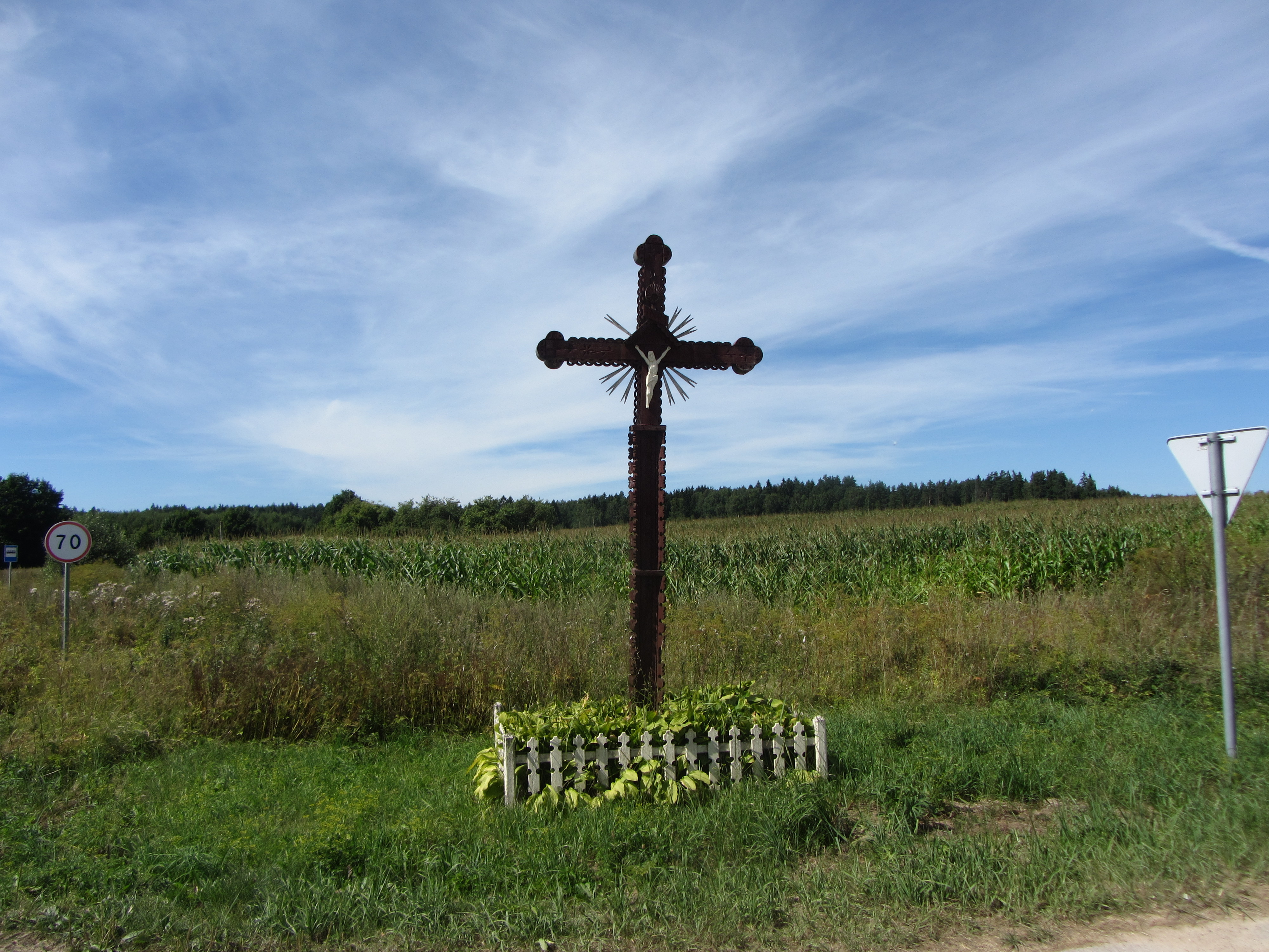 Užpalių sen., Lithuania